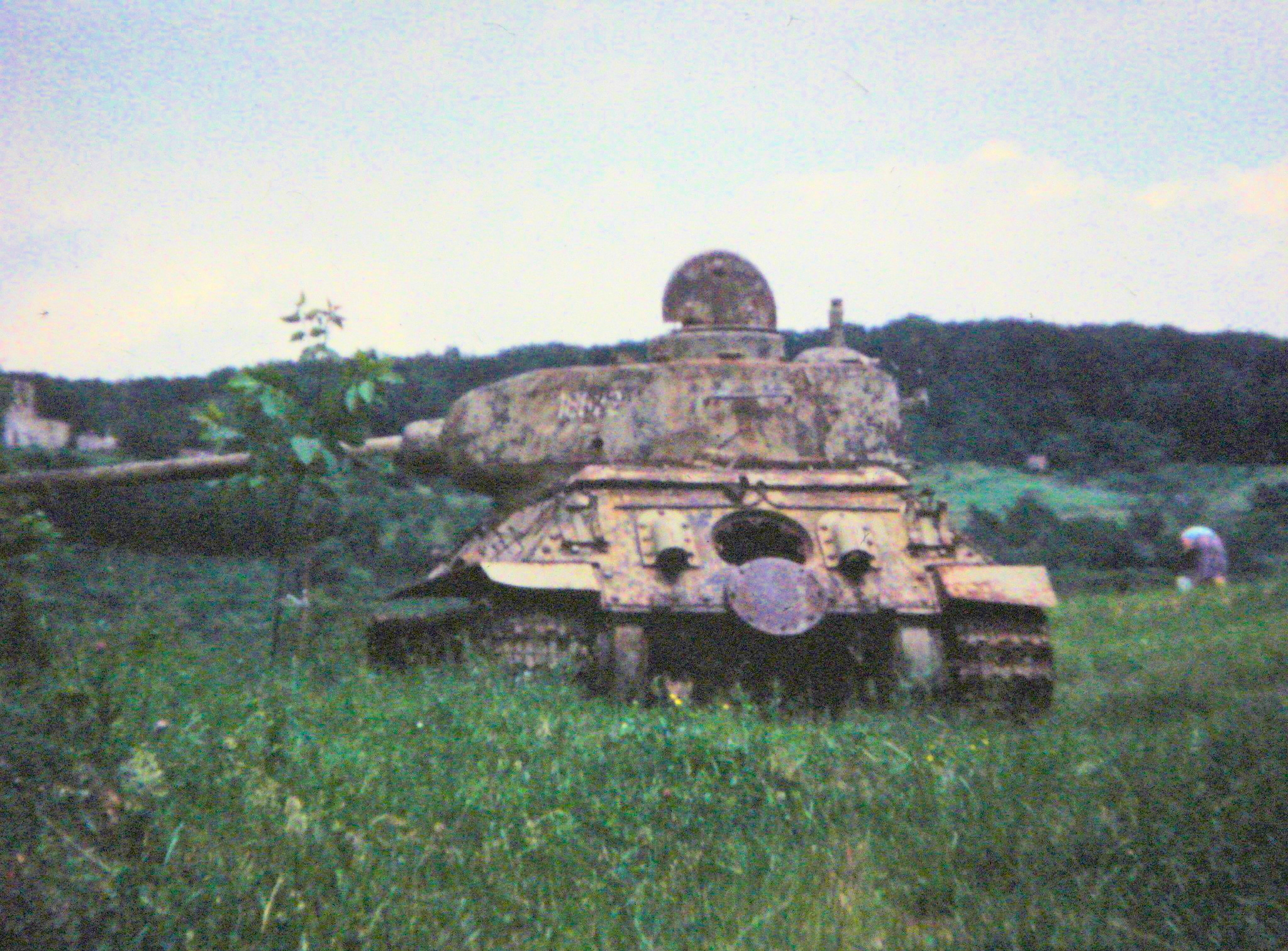 Tanque T34 en desuso. Vista desde atrás. Emplazado en el barrio de Gavrinica - Pakrac. Mayo de 1994.